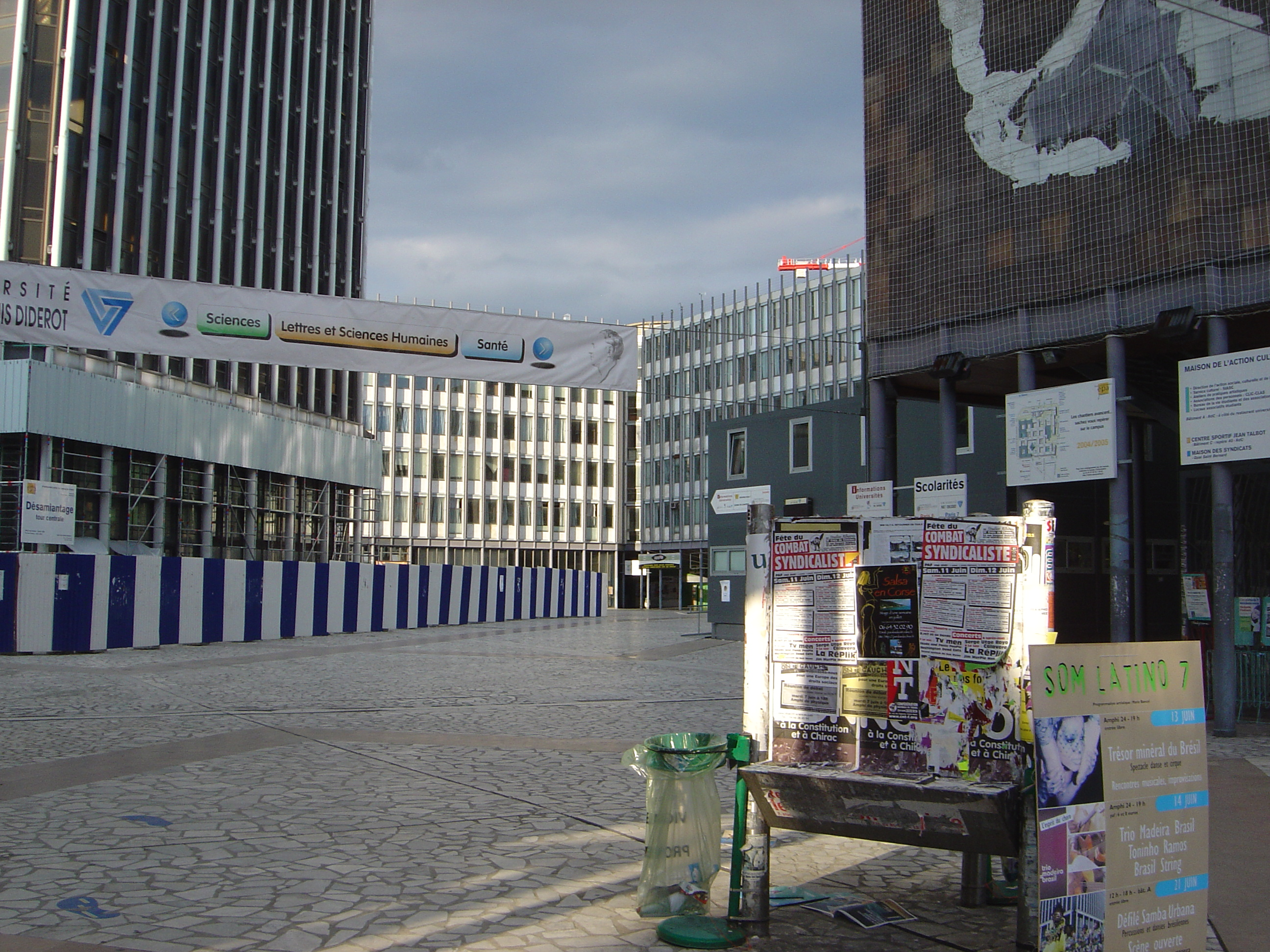 Entrée du Campus universitaire de Jussieu, Paris.